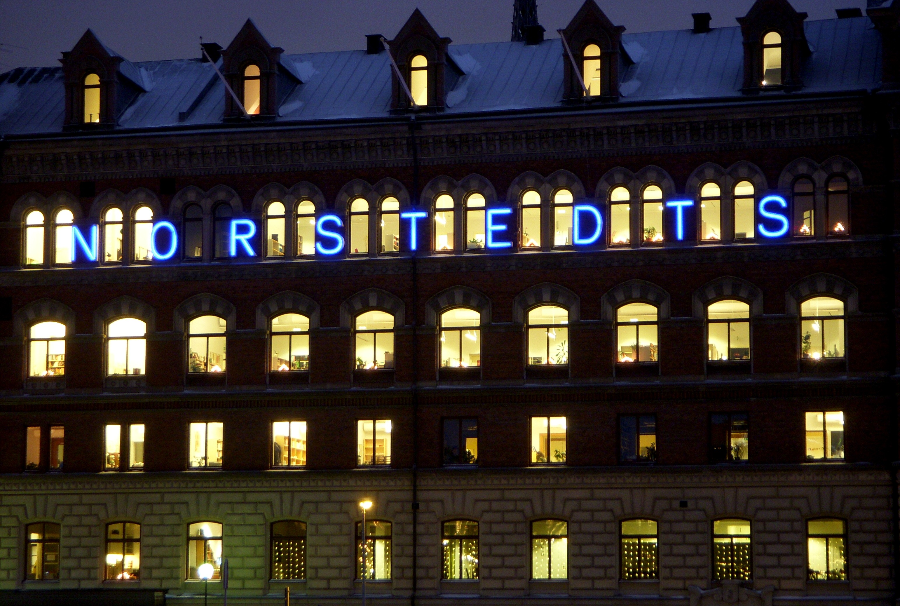 "Norstedts" skylt (från Centralbron)